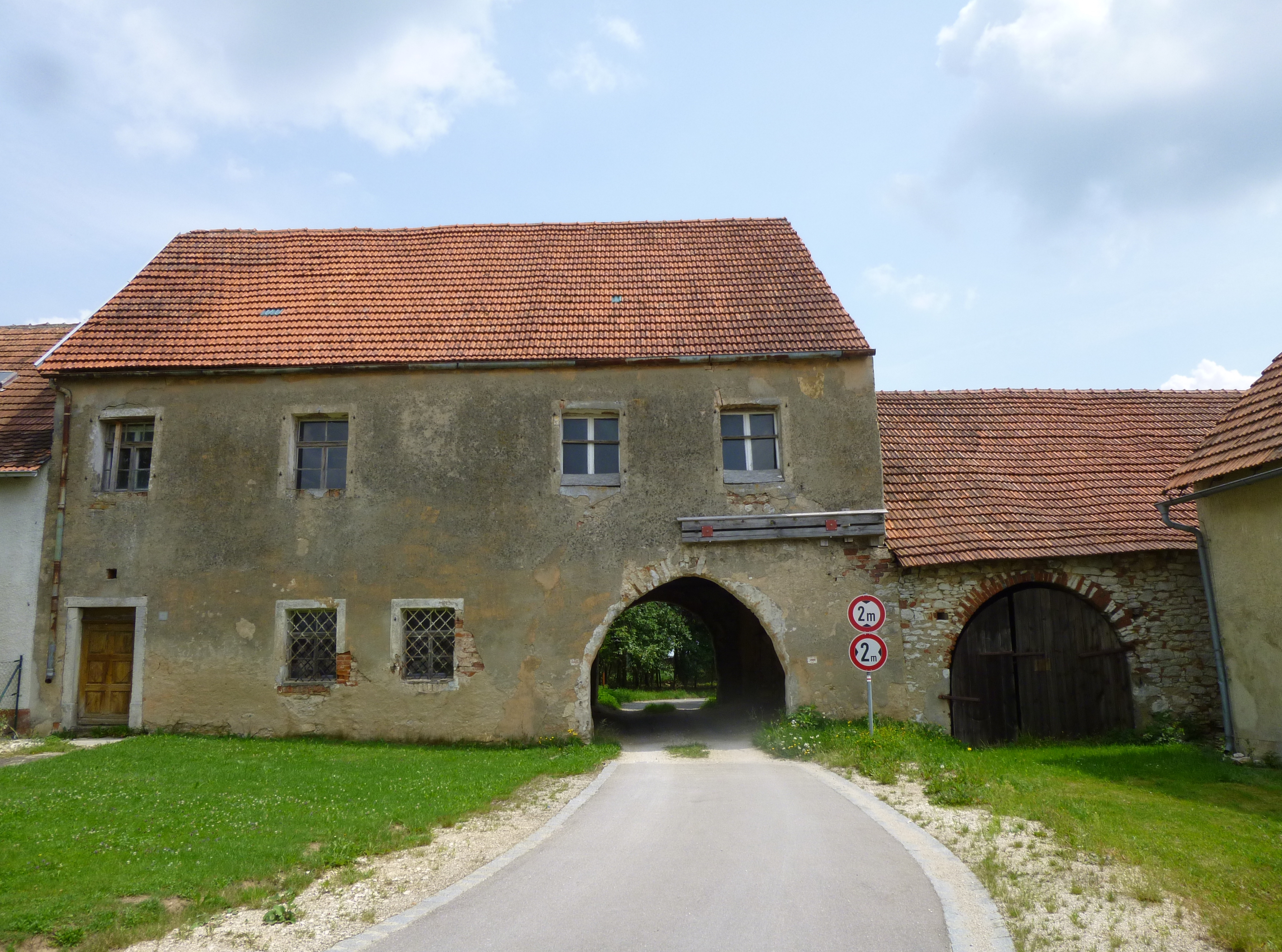 Torhaus des ehem. Jagdschlosses Hirschwald/Ensdorf